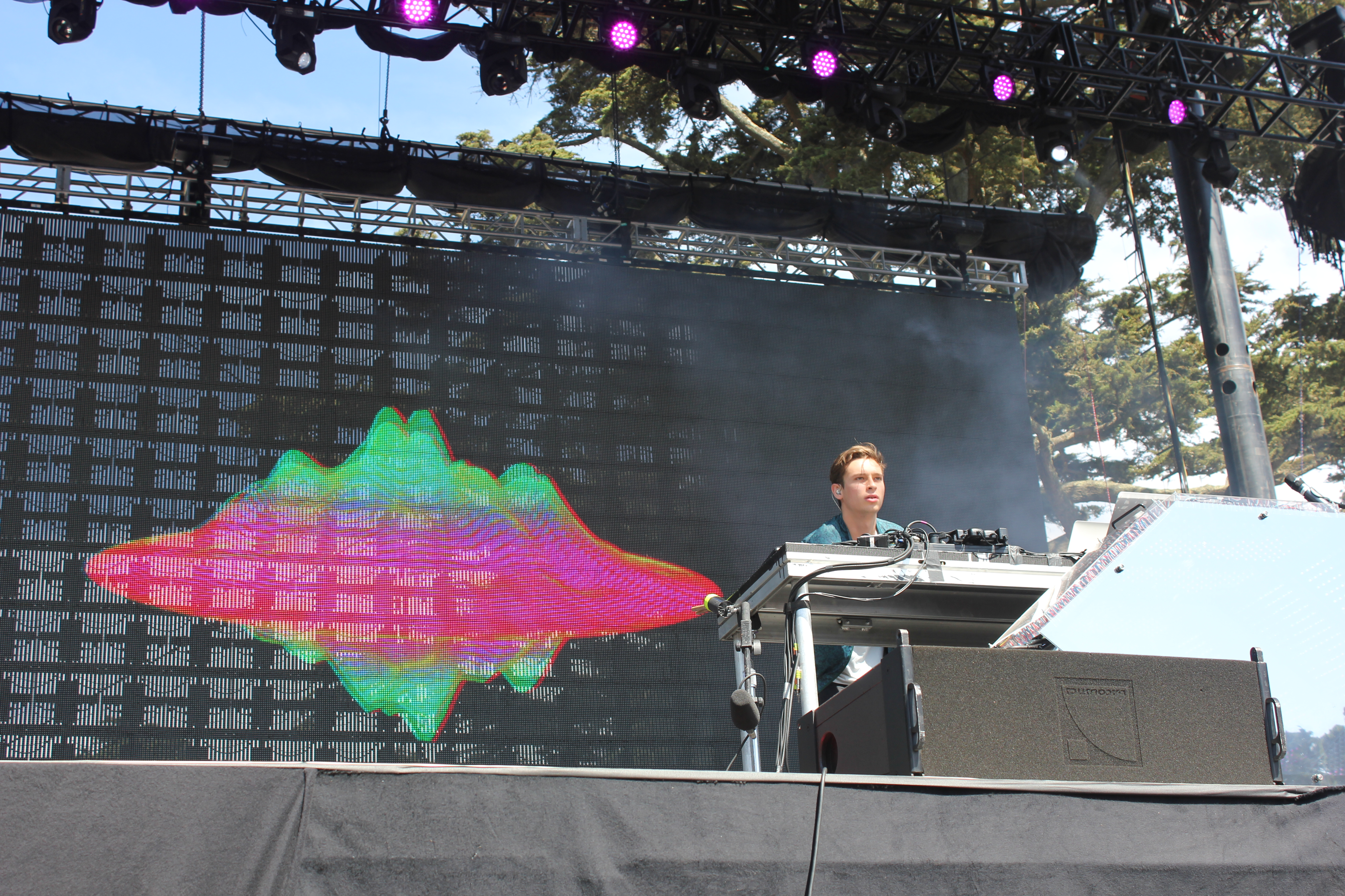 Flume